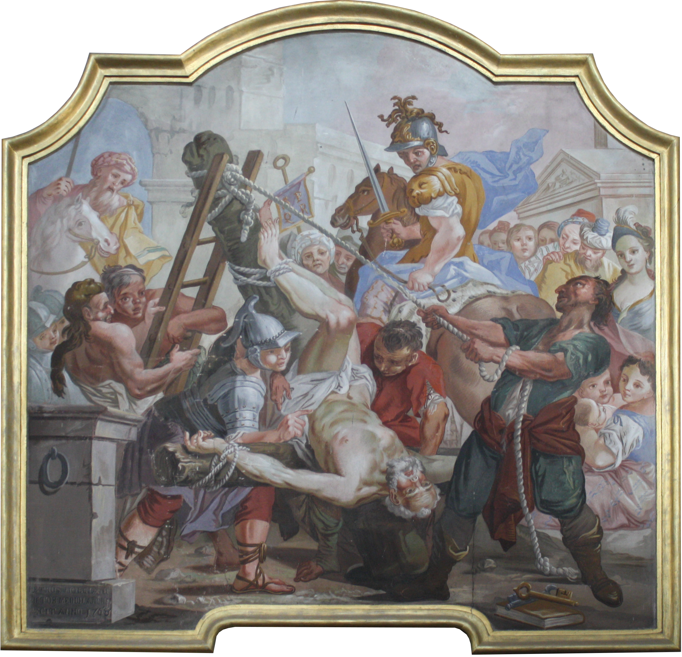 Il Martirio di San Pietro nella chiesa dei Santi Pietro e Paolo a Malesco (VB).